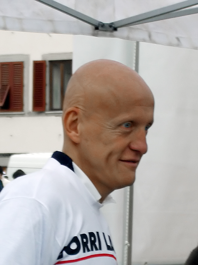 Pierluigi Collina bei einer Veranstaltung in Florenz